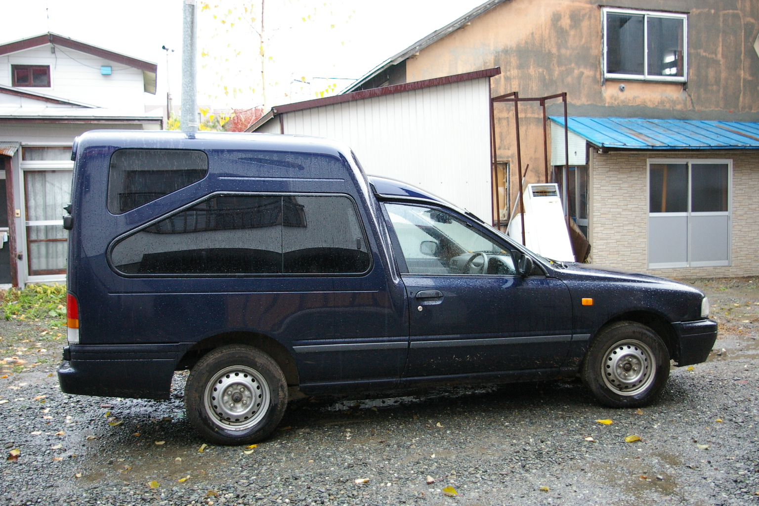 Nissan AD-MAX van,R-VFGY10.